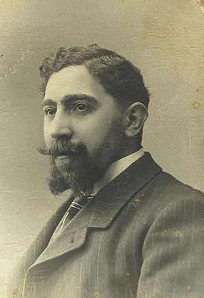 Mariano Pedrero López en 1904